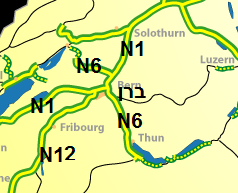 Autobahnnetz Schweiz